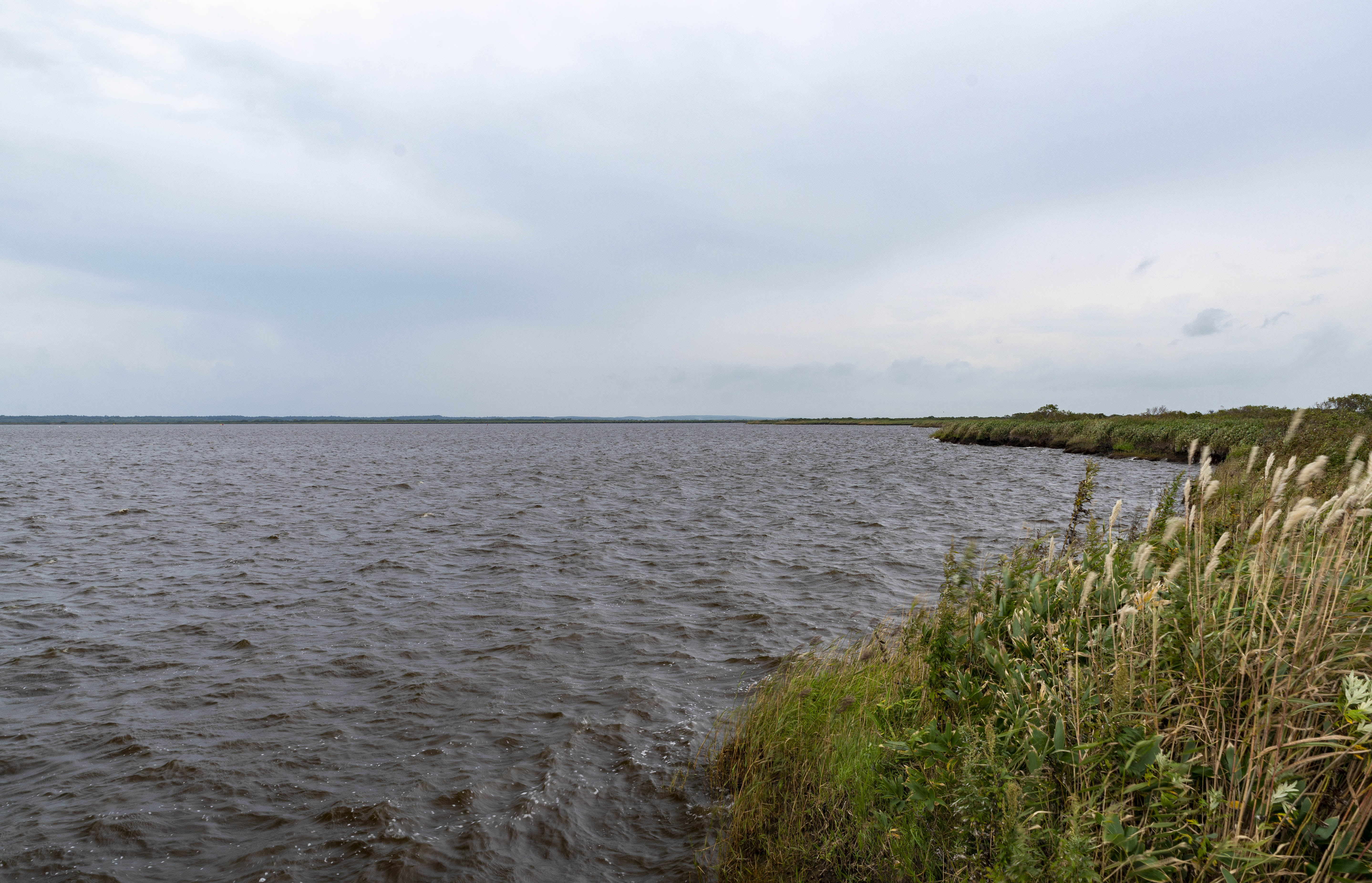 幌延町のパンケ沼